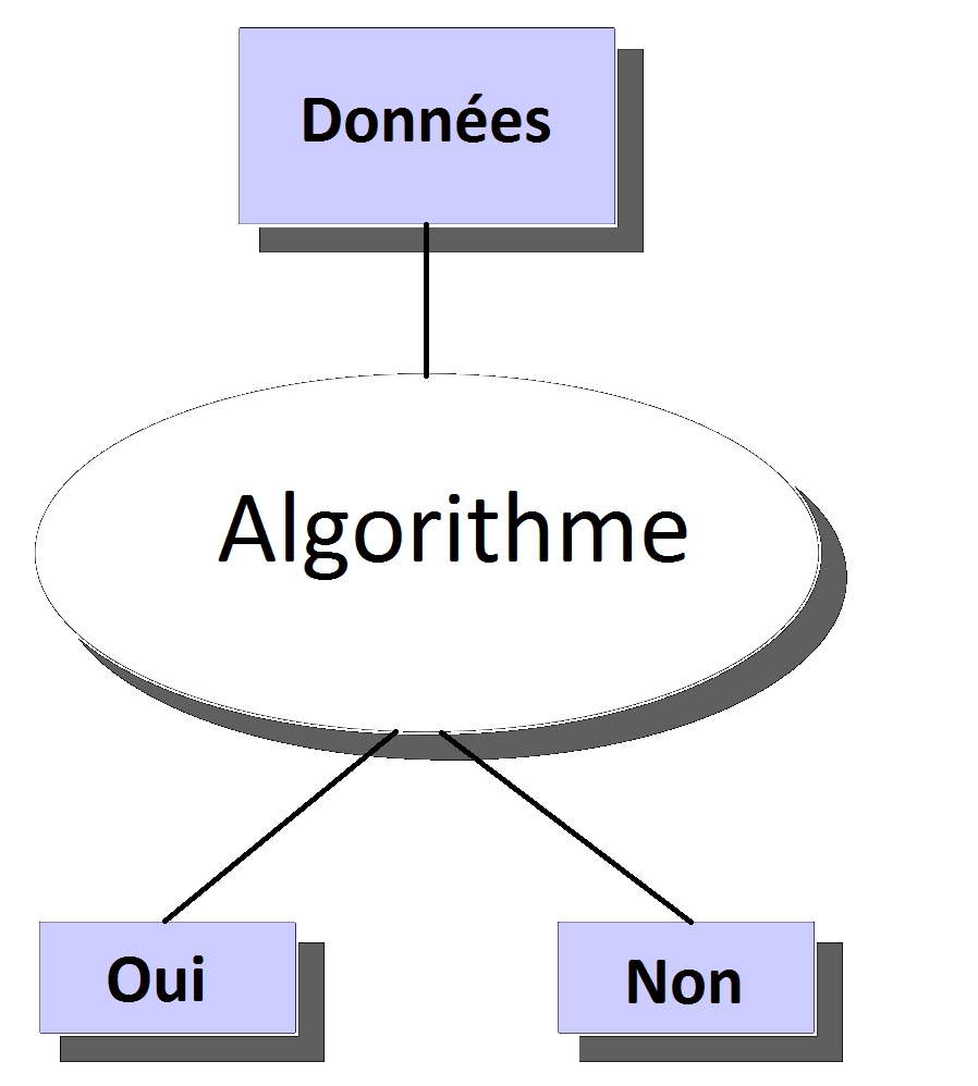 schéma explicatif du problème de décision